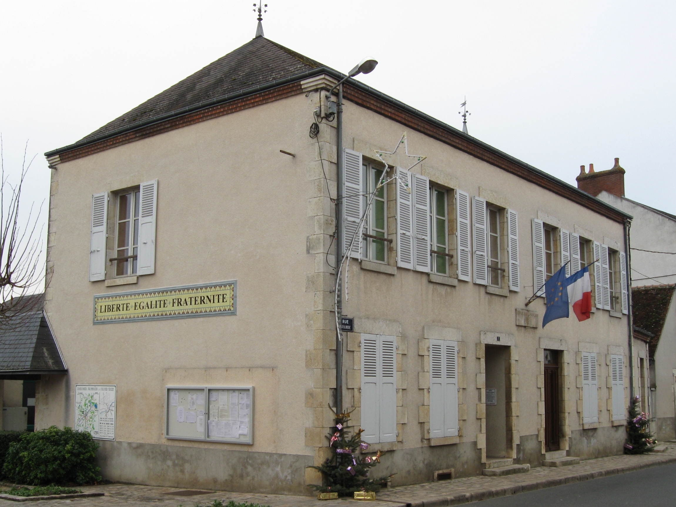 Mairie d'Ouzouer-sur-Trézée